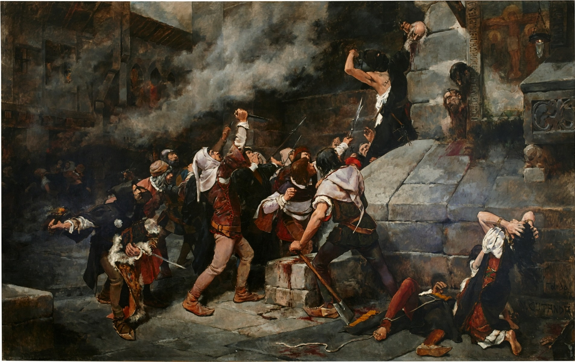 La obra representa una matanza de judíos llevada a cabo en la Edad Media en la ciudad de Toledo, (España).